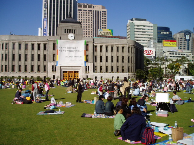 서울광장.